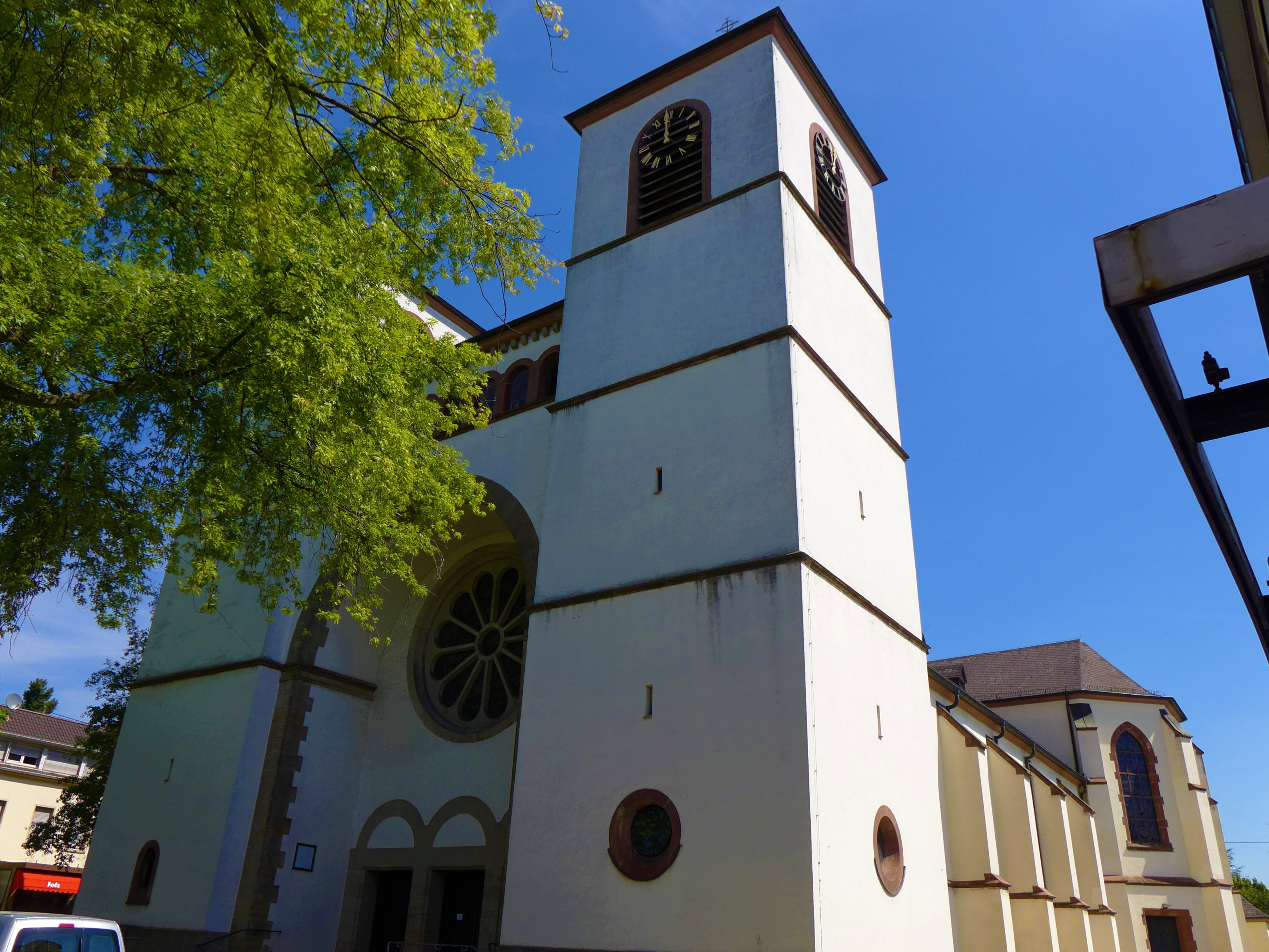 Maria Himmelfahrt (Roden), Außenfassade